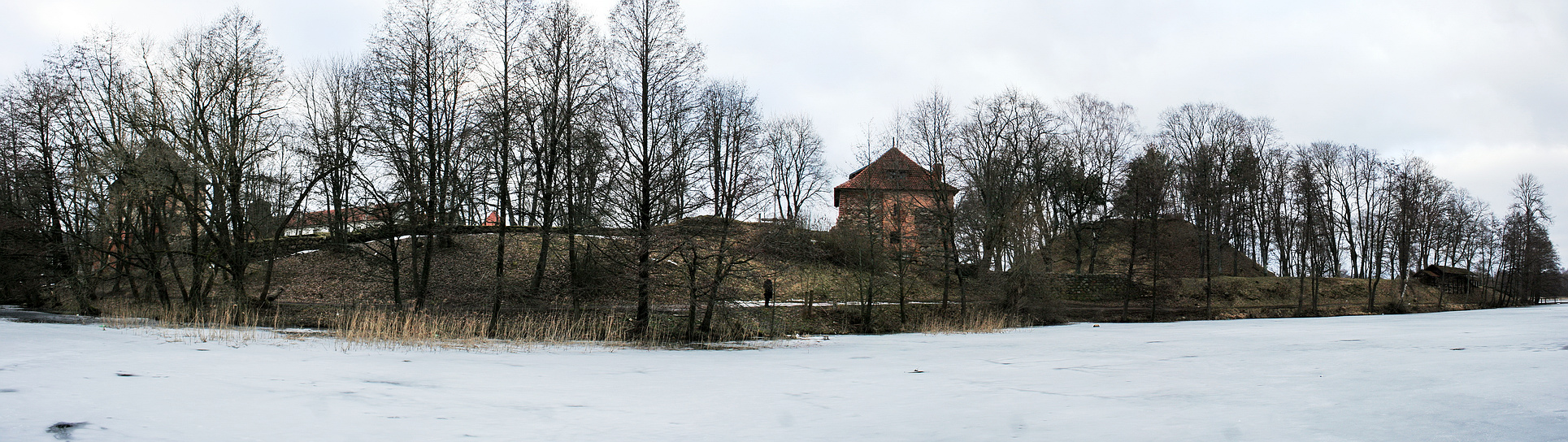 Trakai Peninsula Castle